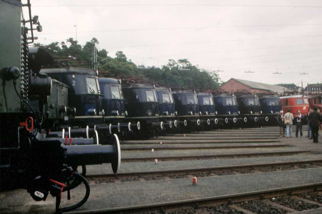 118er Parade im Bw Würzburg anlässlich der Abschiedsveranstaltung der Baureihe 118